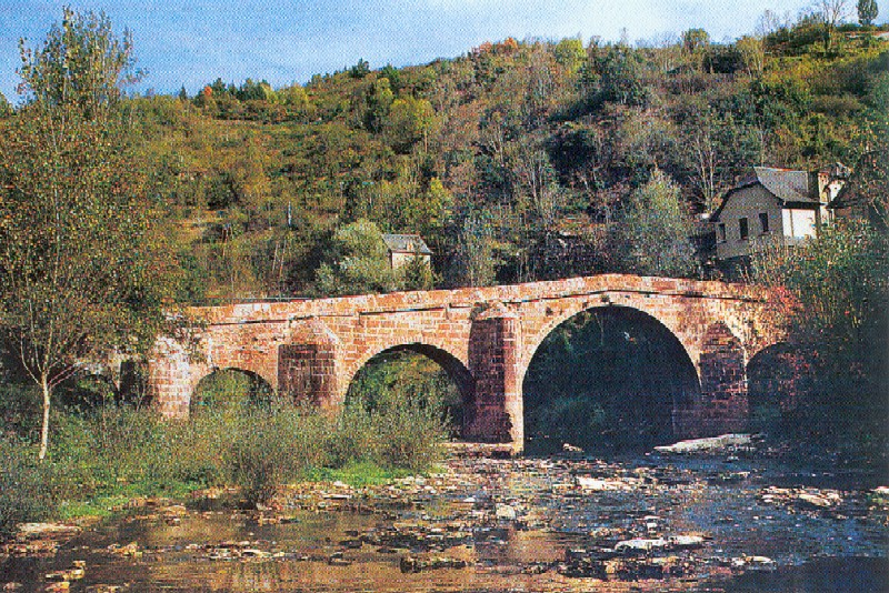 photo papier mars 2000, scanée juin 2002